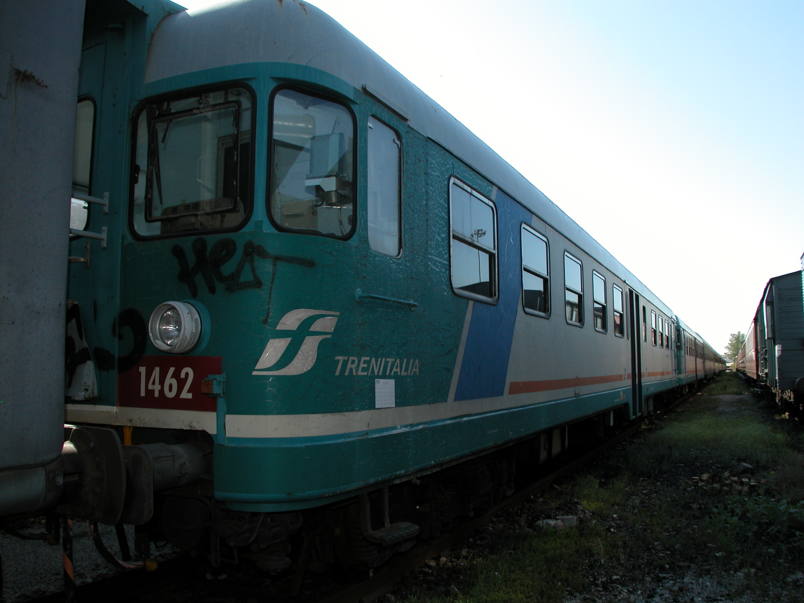 L'automotrice FS ALn 668.1462 accoppiata con l'ALn 668.1478 in attesa di restauro per il parco storico di Trenitalia.